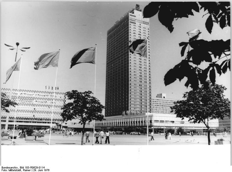 Berlin, Alexanderplatz, Hotel "Stadt Berlin" ADN-ZB Mittelstädt 29.6.76 Berlin - Die Konferenz der kommunistischen und Arbeiterparteien Europas ist am 29.6.76 in der DDR-Hauptstadt Berlin im Interhotel "Stadt Berlin" (unser Foto) eröffnet worden. An der Beratung nehmen Delegationen von 29 kommunistischen und Arbeiterparteien teil.